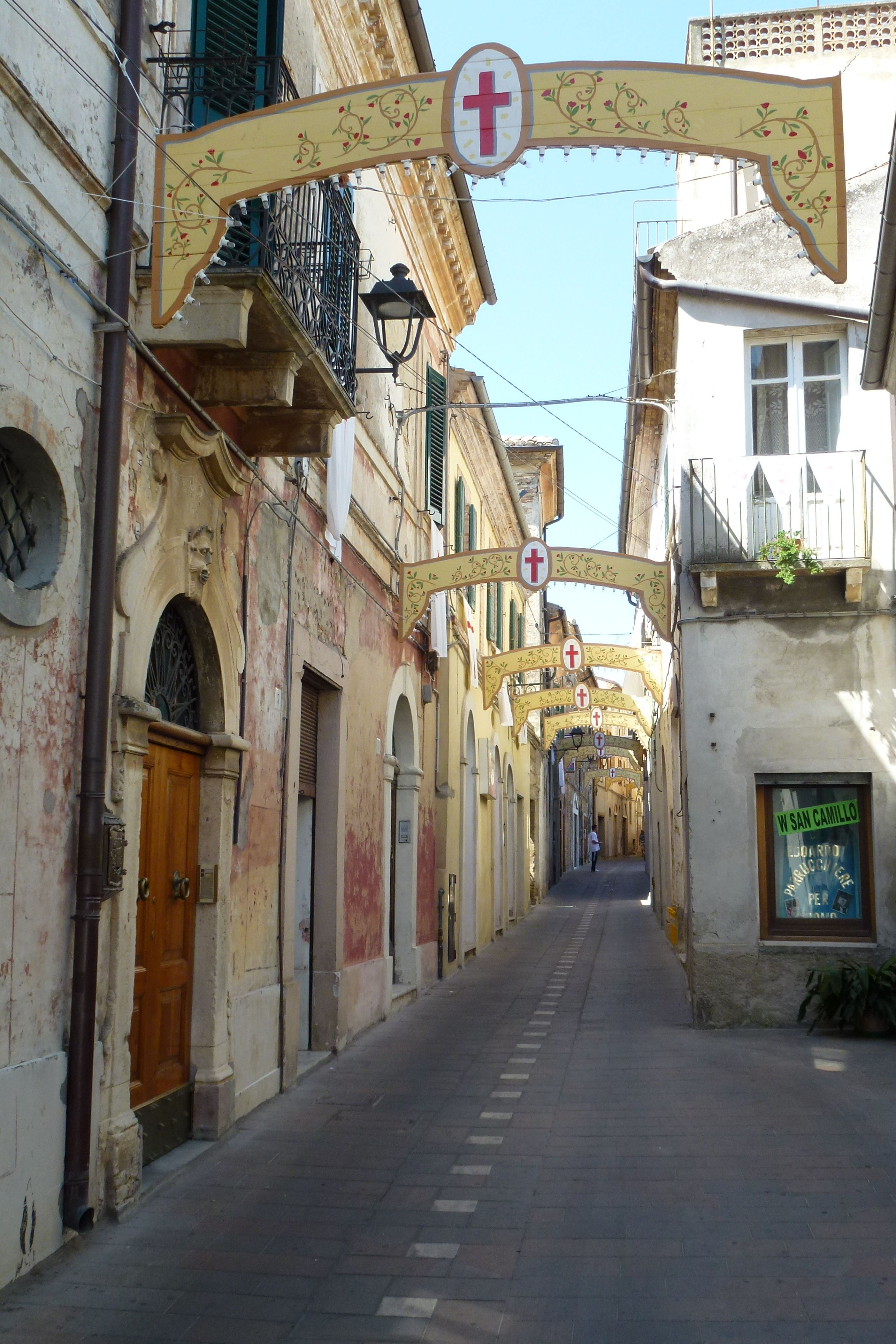 Vie di Bucchianico